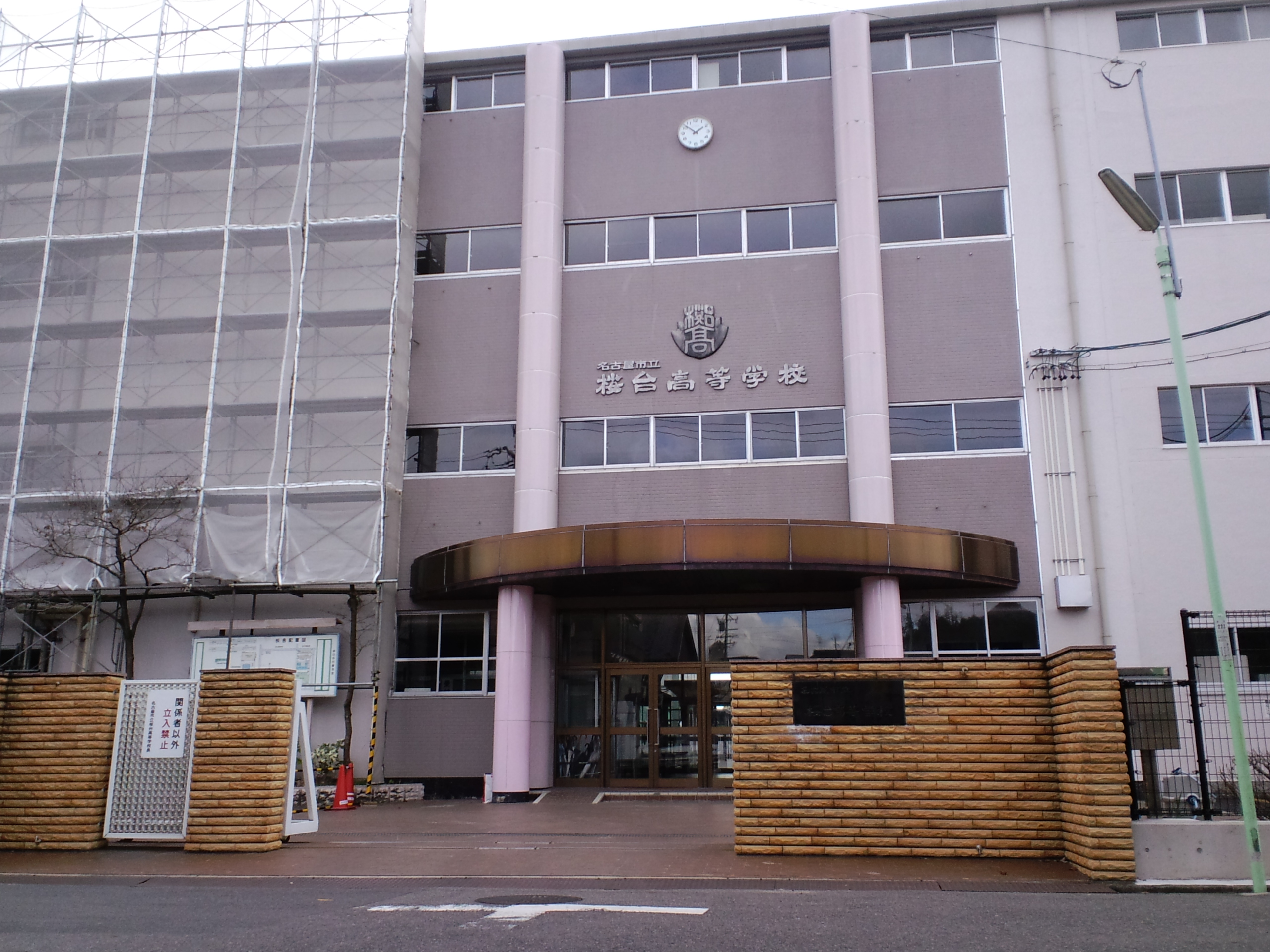 名古屋市立桜台高校